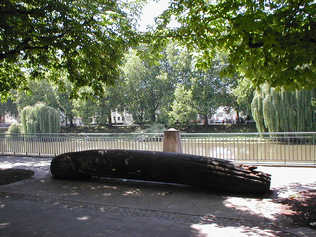 Penisförmige Skulptur Phallocaust III (1984/85) von Franz Gutmann in der Oberen Neckarstraße beim Götzenturm in Heilbronn. Die lange dort befindliche Holzskulptur war später durch die lange Aufstellung im Freien geschädigt und wurde dann entfernt.